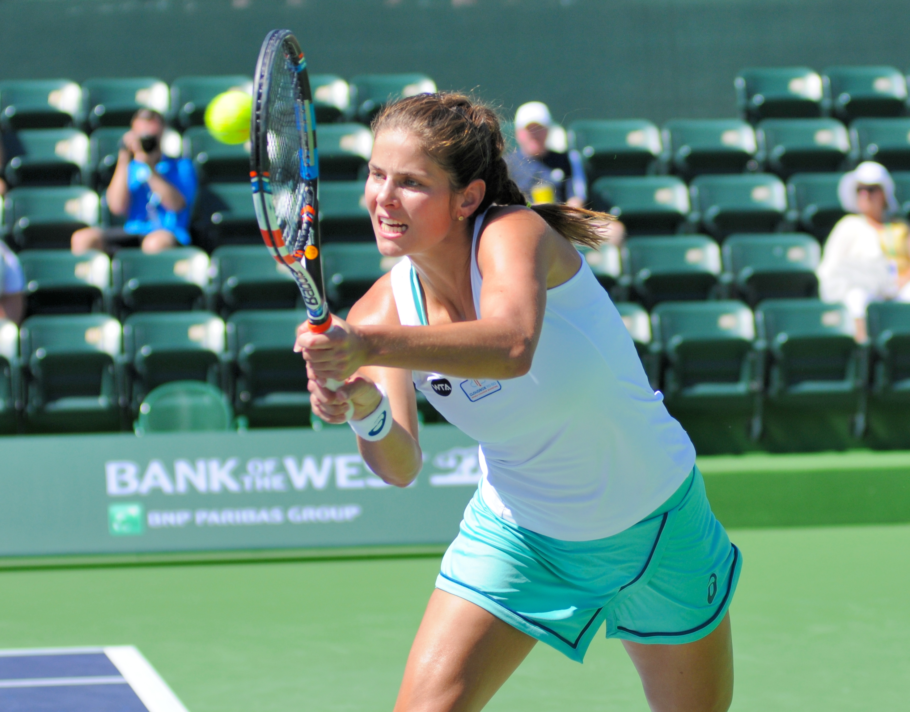 BNP Paribas Open 2016